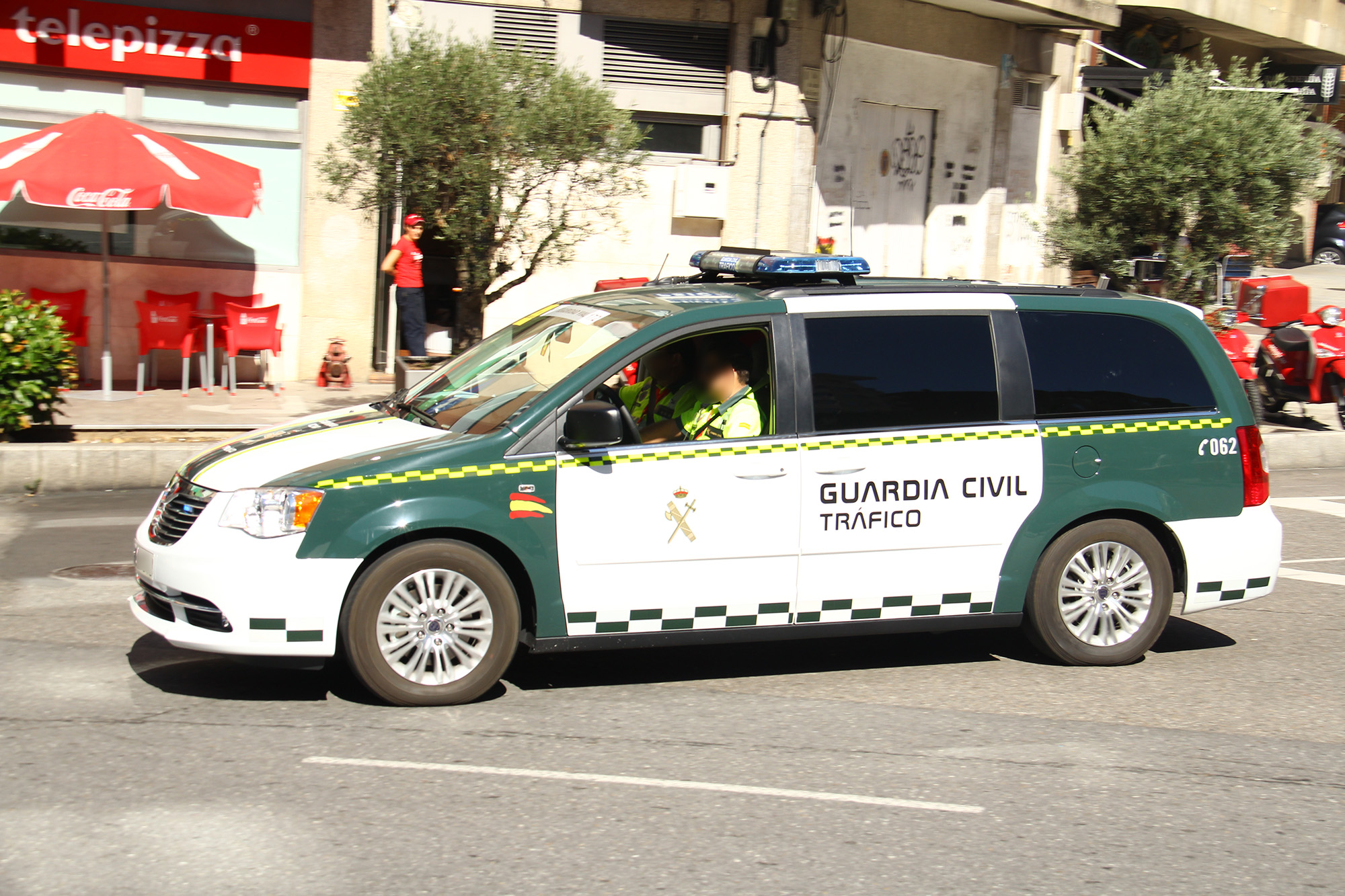 Furgoneta de la Guardia Civil en la Vuelta ciclista a España 2016 en Vigo.